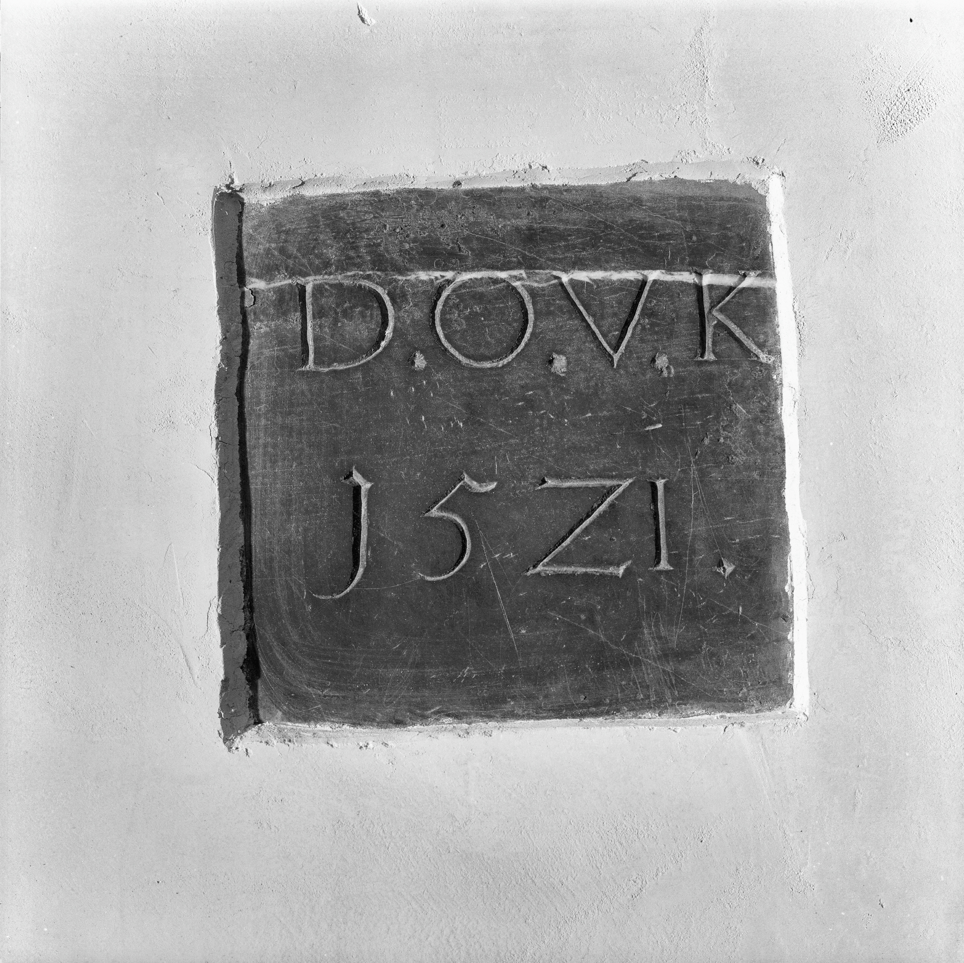 Nederlands Hervormde Kerk: INTERIEUR, STEEN MET INSCRIPTIE IN DE OOSTWAND VAN DE TOREN ONDER ORGELGALERIJ